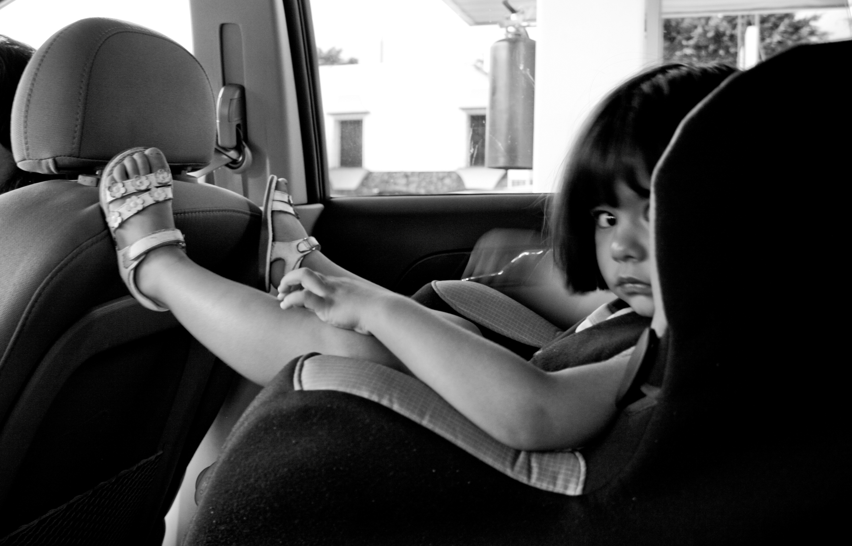 Tlayacapan, Morelos